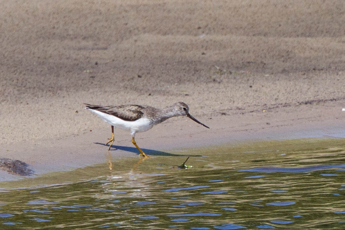 Terek Sandpiper (Xenus cinereus)